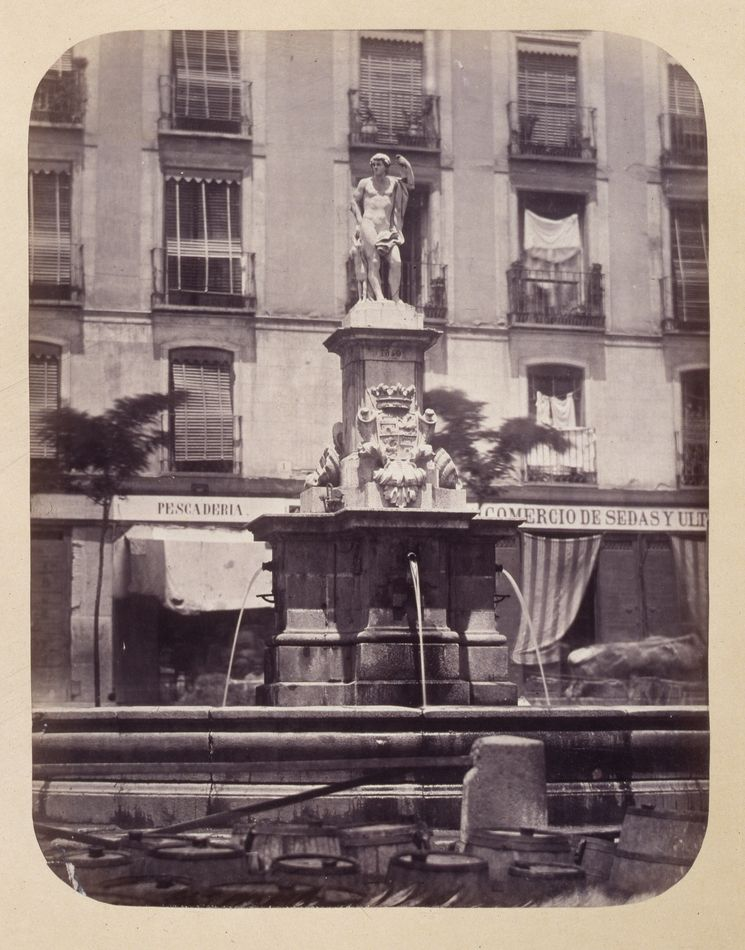 Fuente de la Plaza de Lavapiés. Obra en 1864 del fotógrafo toledano Alfonso Begué, muerto el 31 de octubre de 1865. Cartulina sepia. Albúmina. 43 x 32 cm. Fotografía contenida en un álbum procedente del Archivo de Villa y trasladado al Museo de Historia en 1983.